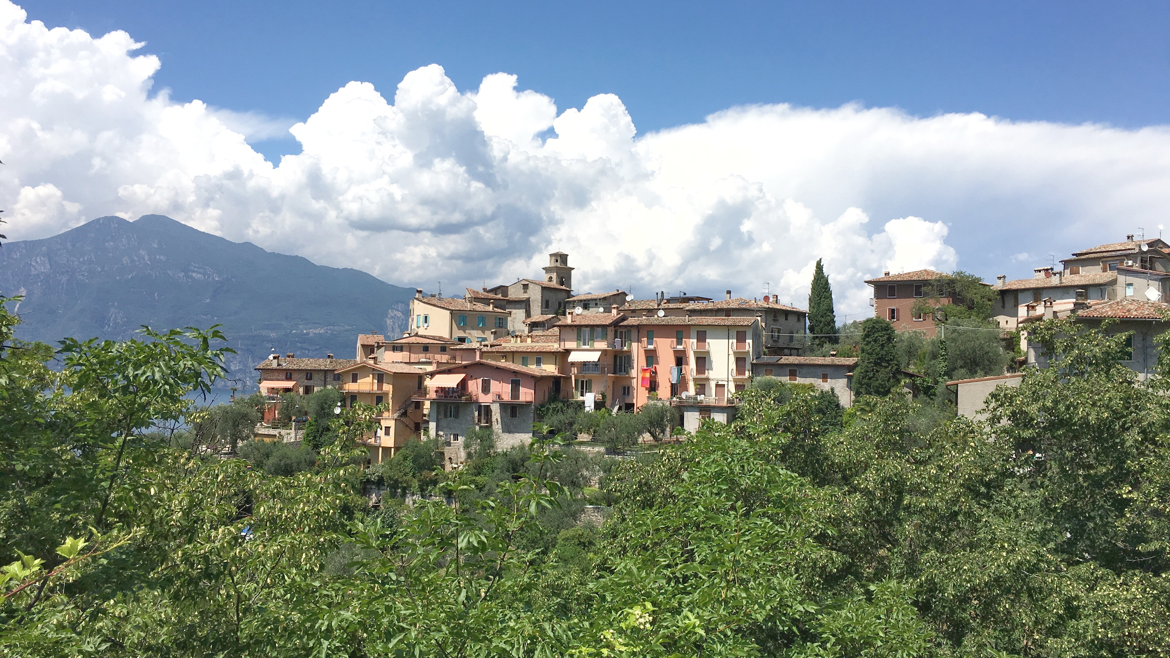 Pai di sopra